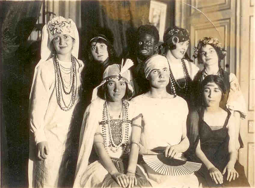 Une fête costumée chez des russes blancs (la famille Gavronsky) à Paris en 1925 186 rue de Rivoli. Noms des présents : de gauche à droite, ligne du fond : Hélène Gavronsky, Genia Kovarsky, Genia Marchak, Inconnue, Lena Marchak. 1er rang assis : Vera, Gleb Kerenski, Katia Gavronsky.